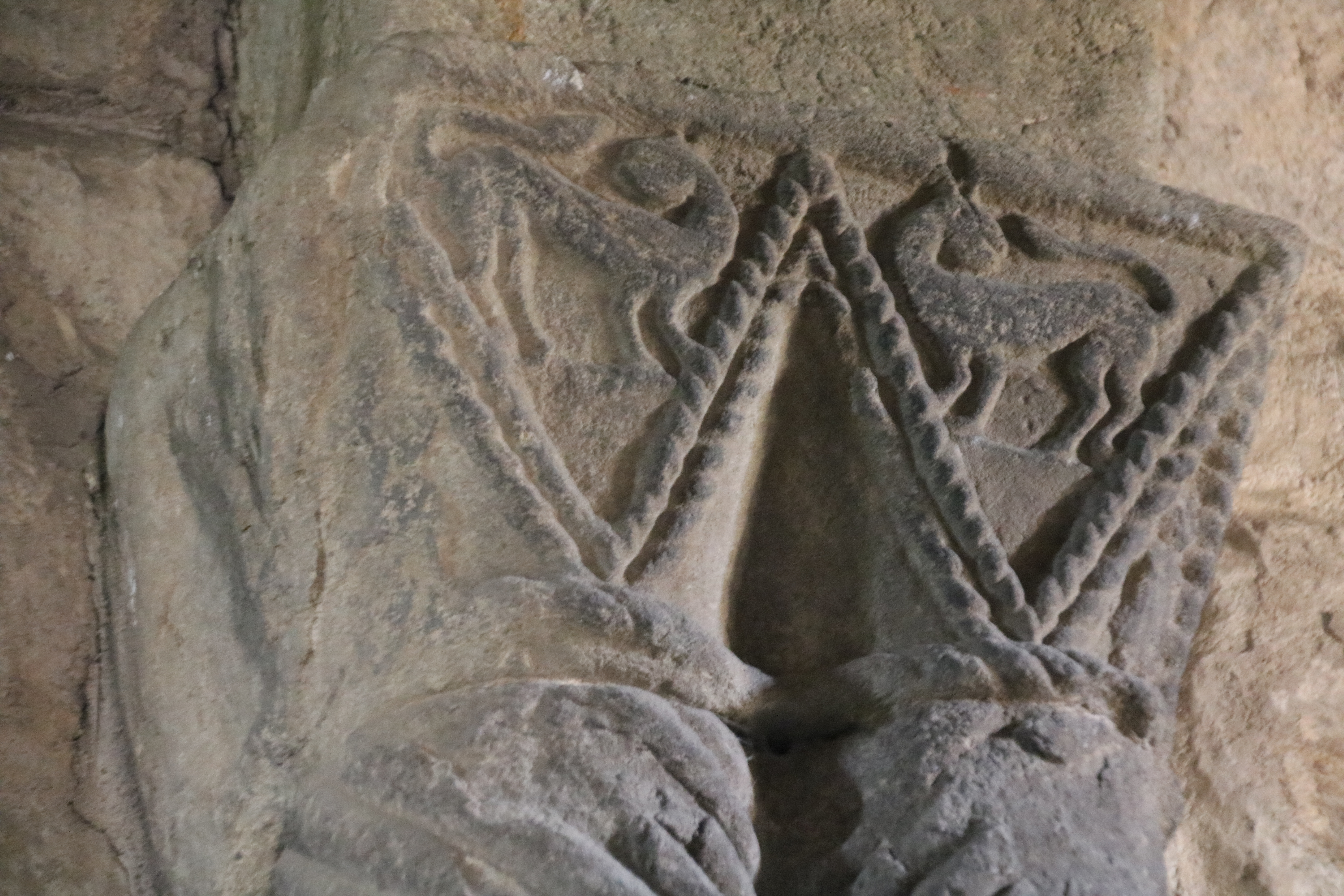 Camino de San Salvador_tappa da Pajares a La Pola de Lena